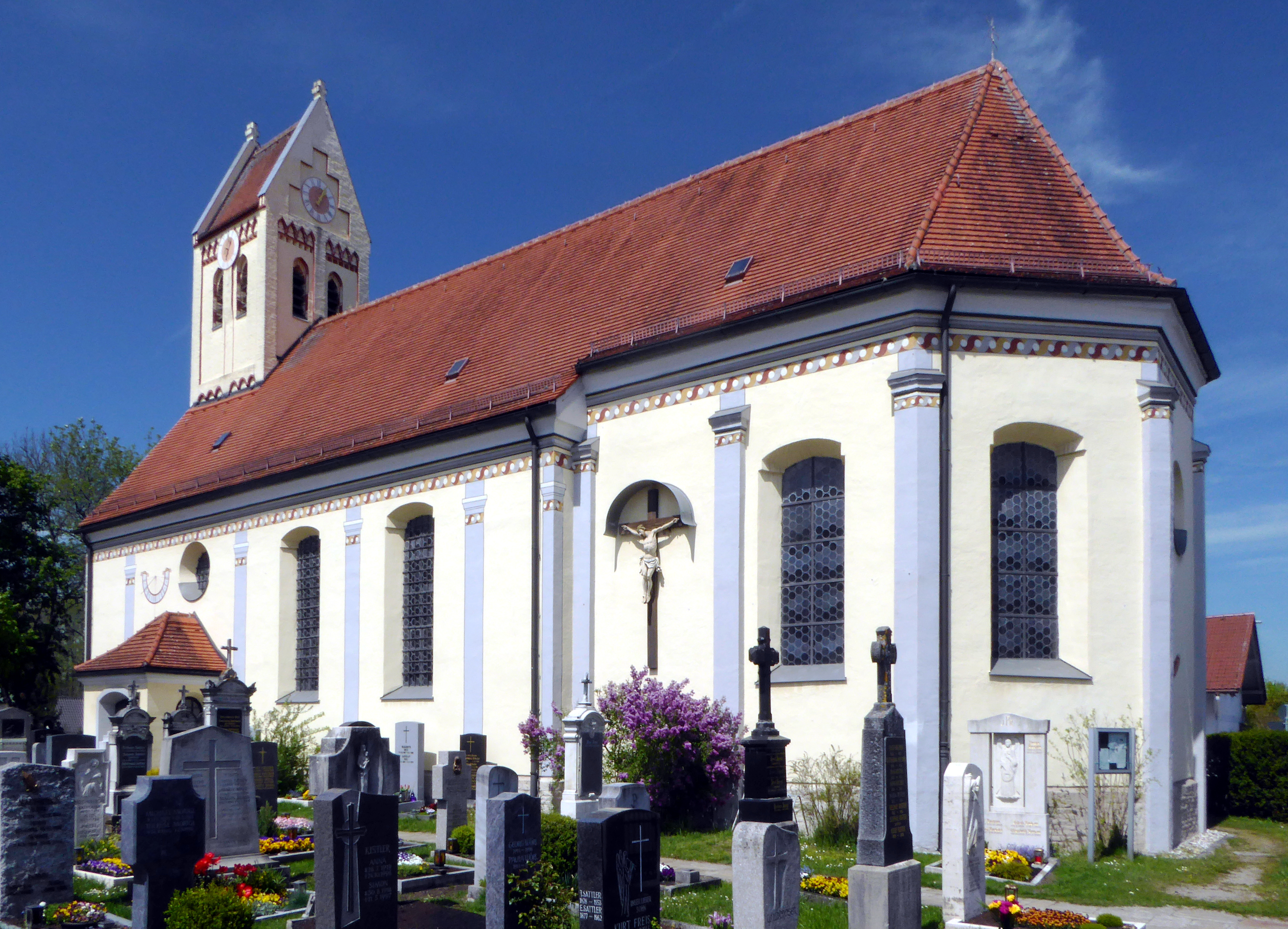 Allach (München), Peter-und-Paul-Kirche von Südosten gesehen.